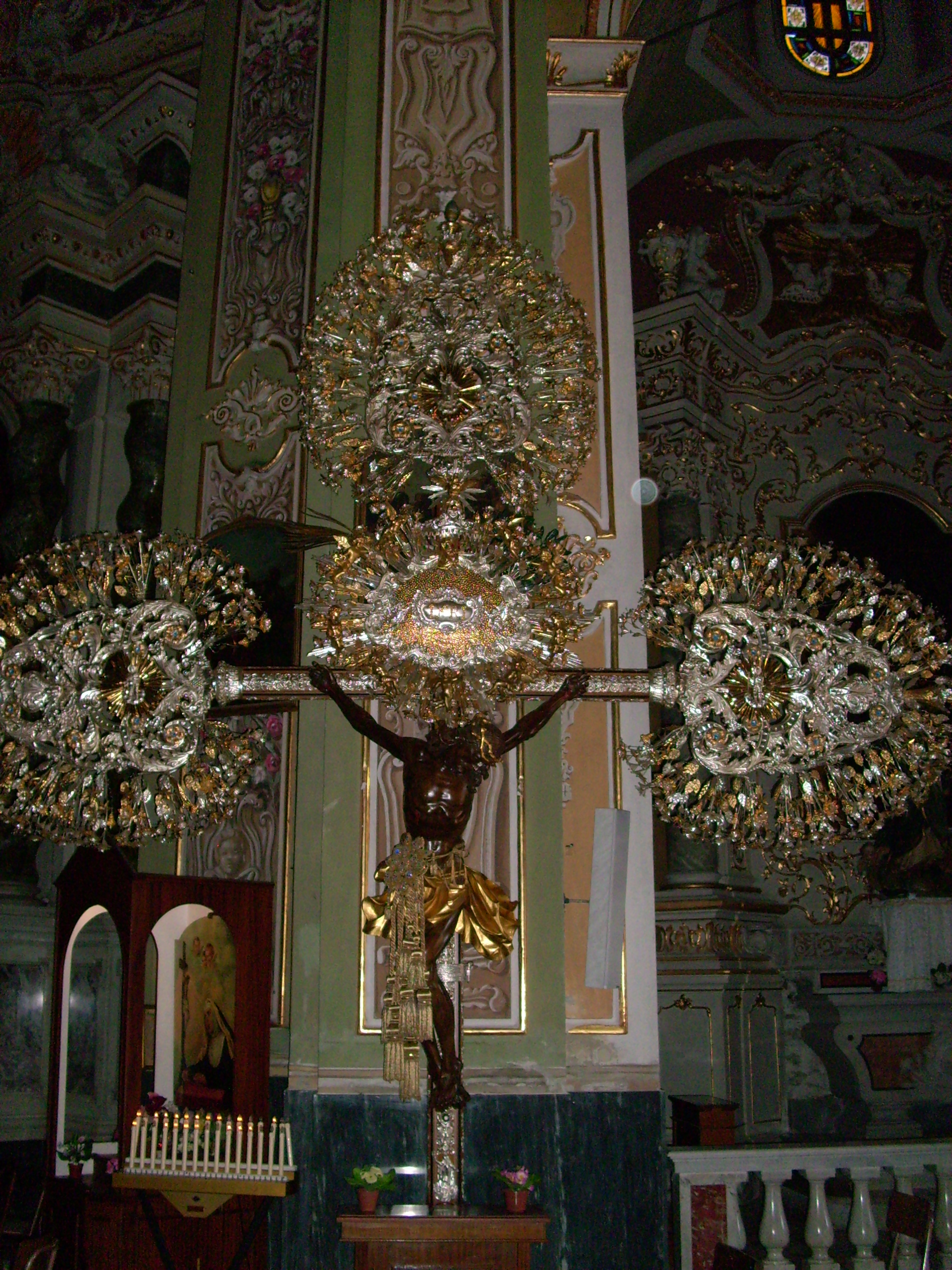 Crocifisso all'interno della chiesa dei santi Nazario e Celso di Arenzano, Liguria, Italia